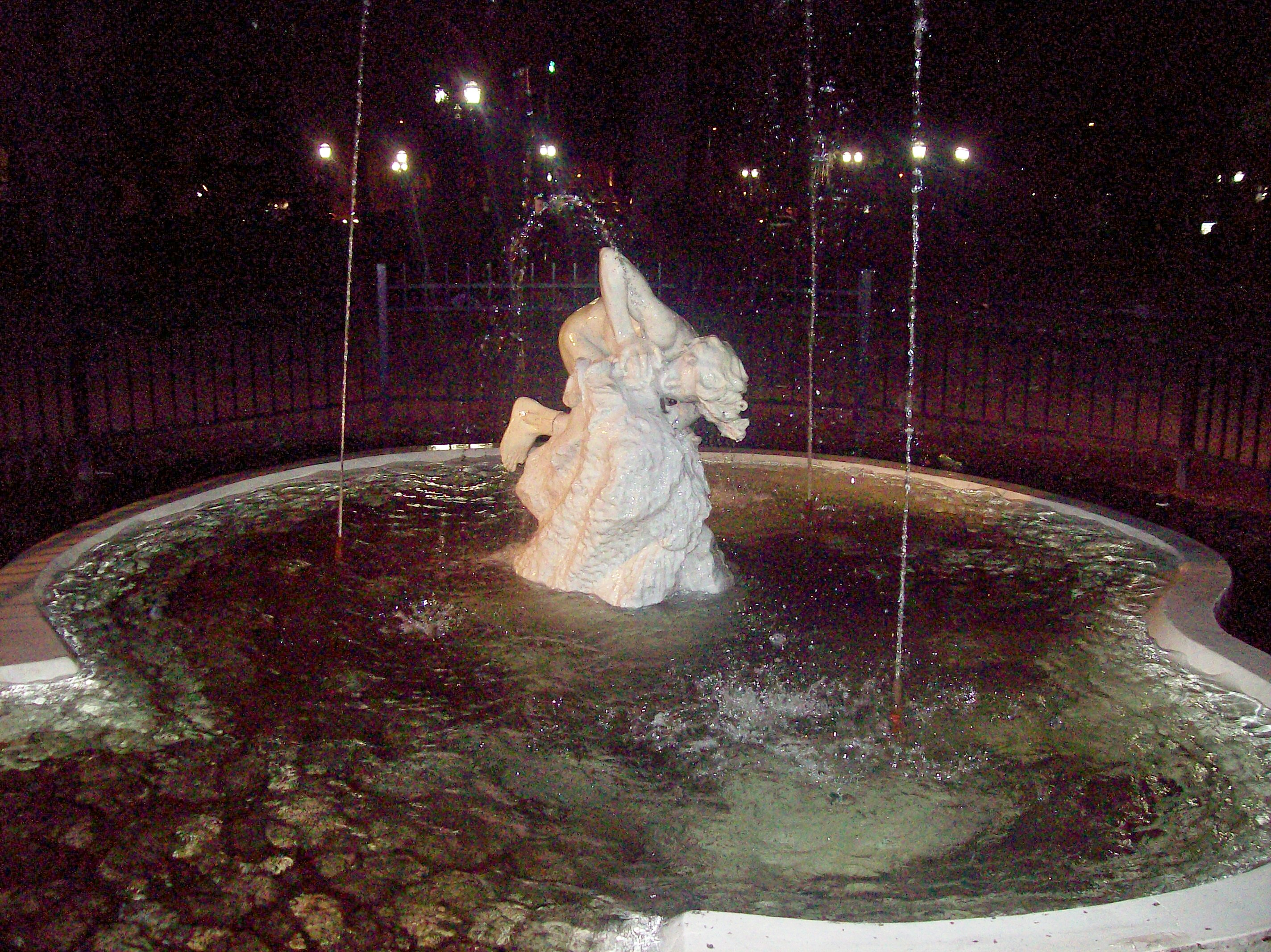 Escultura "El sediento" de Luisa Isabel Isella de Motteau, en la Plaza Rodríguez Peña, en Buenos. Aires, a unos 20 m de Callao, al 950 aprox.